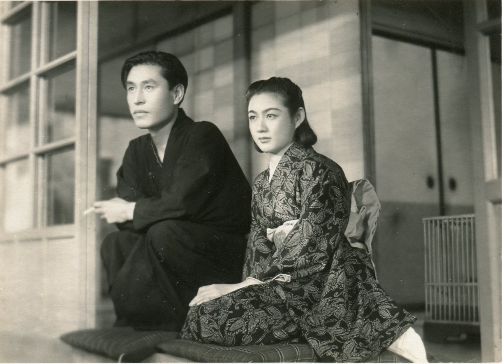 映画『戸田家の兄弟』(1941年) のスチール写真。佐分利信（左）、桑野通子（右）